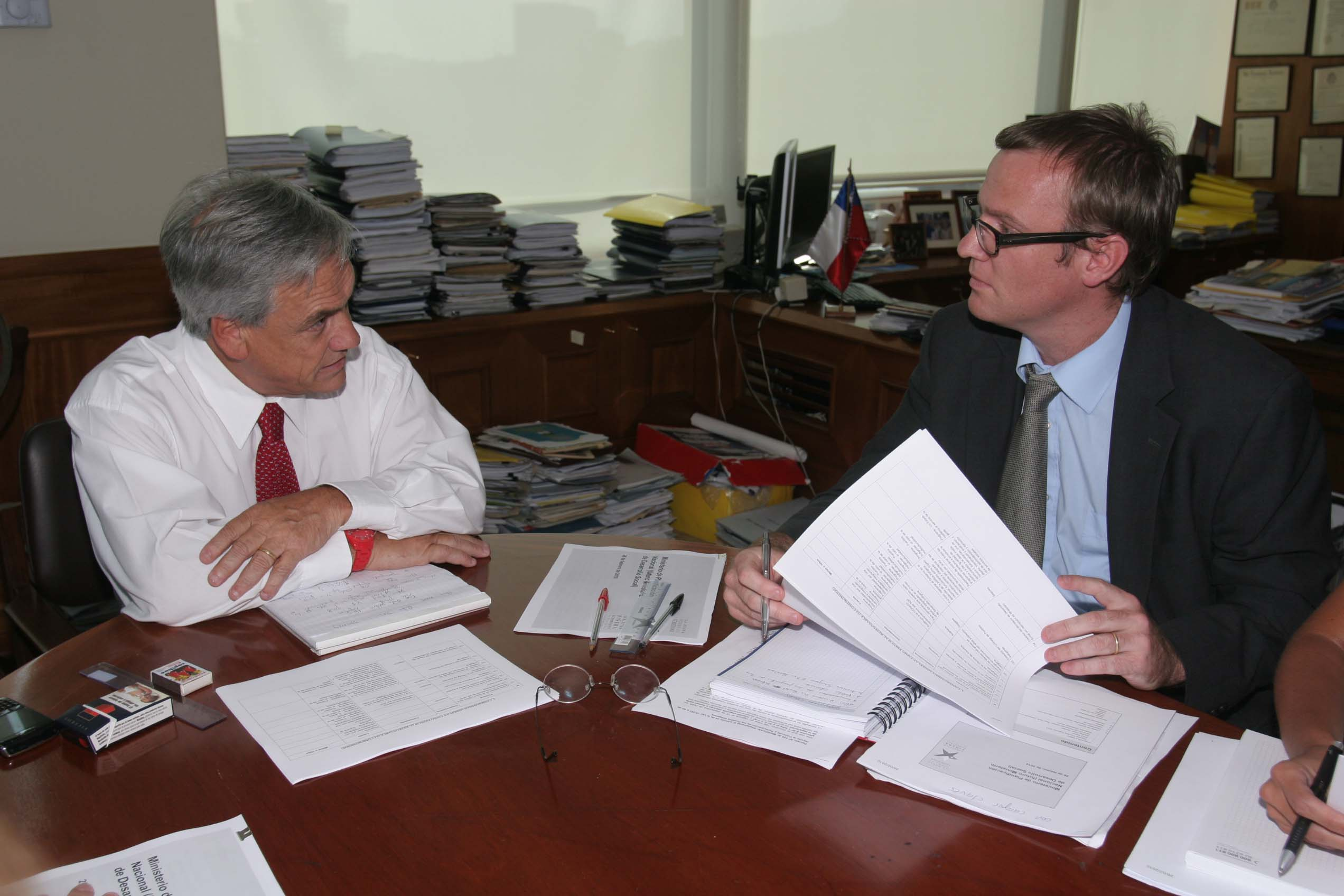 Ministro de Planificacion